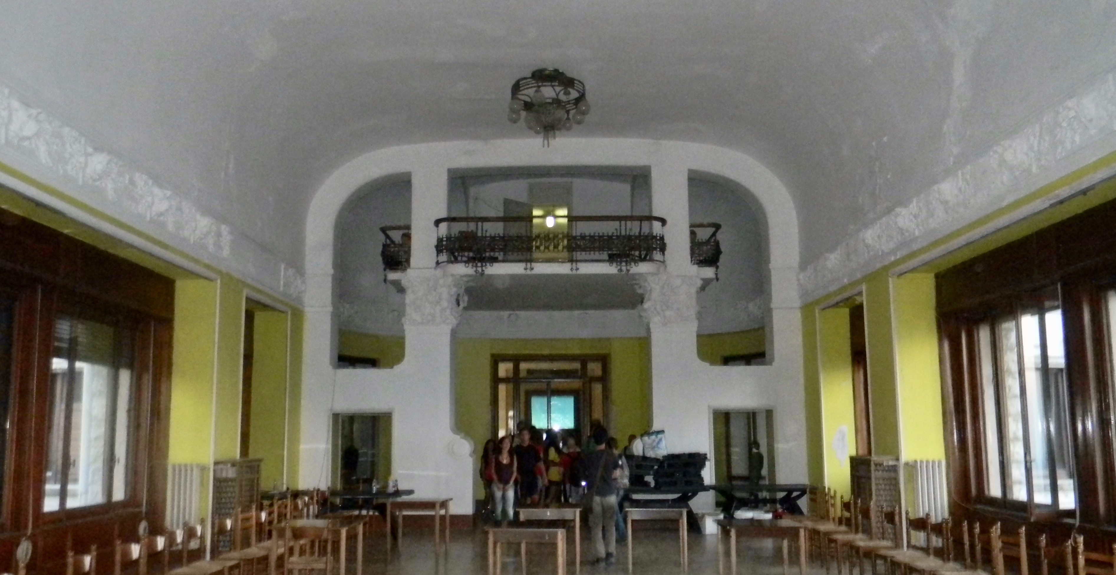 Salon of Grand Hotel Campo dei Fiori